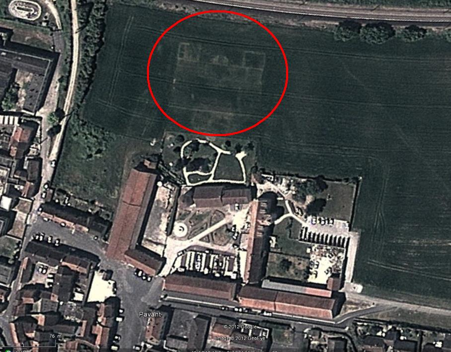 ruines du chateau de pavant louis le vau